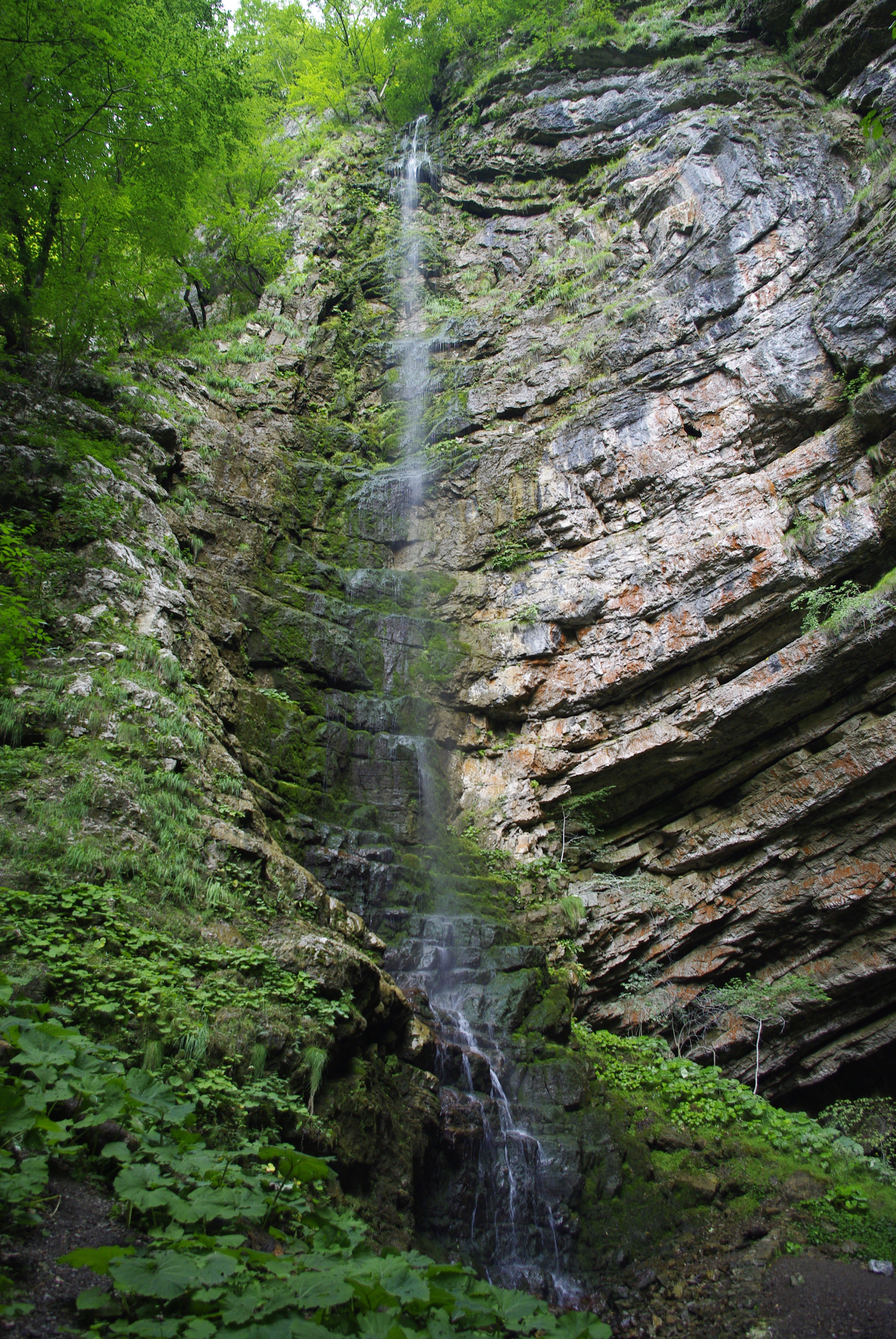 Zaštićeni krajobraz Zeleni vir i Vrajži prolaz u blizini Skrada. Gorski kotar This is a a photo of a natural area in Croatia with ID: SL03